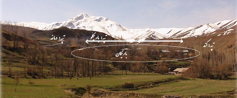 نماي باريكان در ميان دو تپه